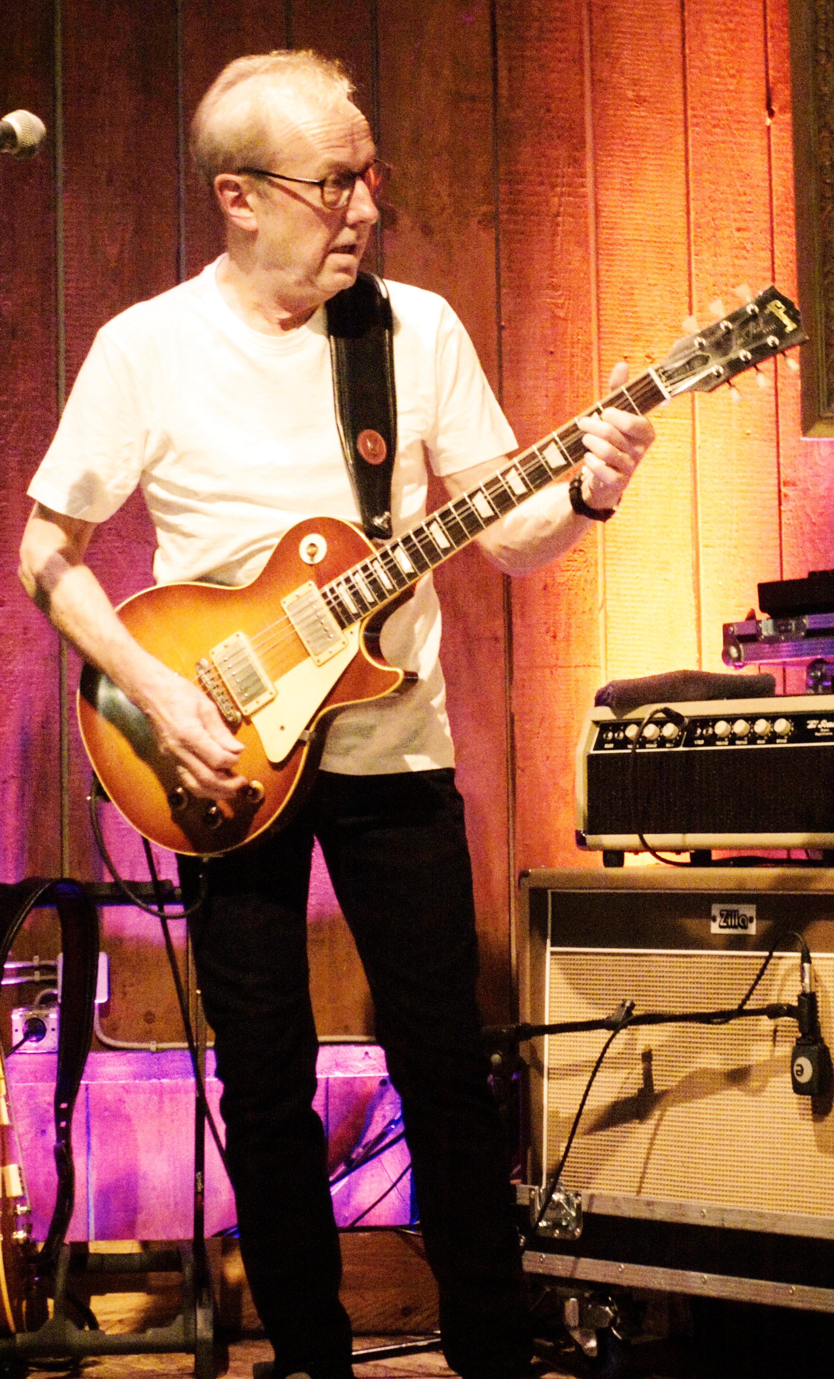 Clem Clempson mit JCM in der Bluesgarage Isernhagen 27. April 2019